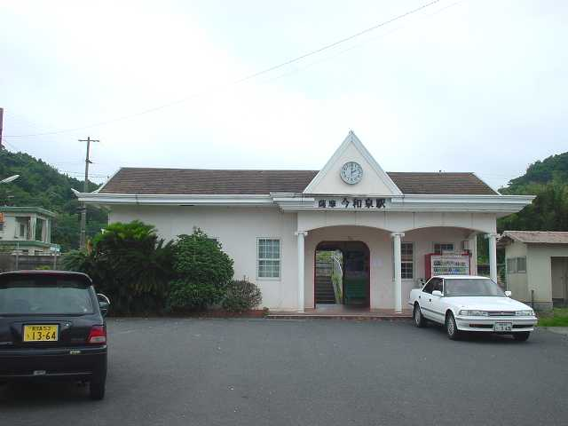 薩摩今和泉駅（2005年7月投稿者が撮影）